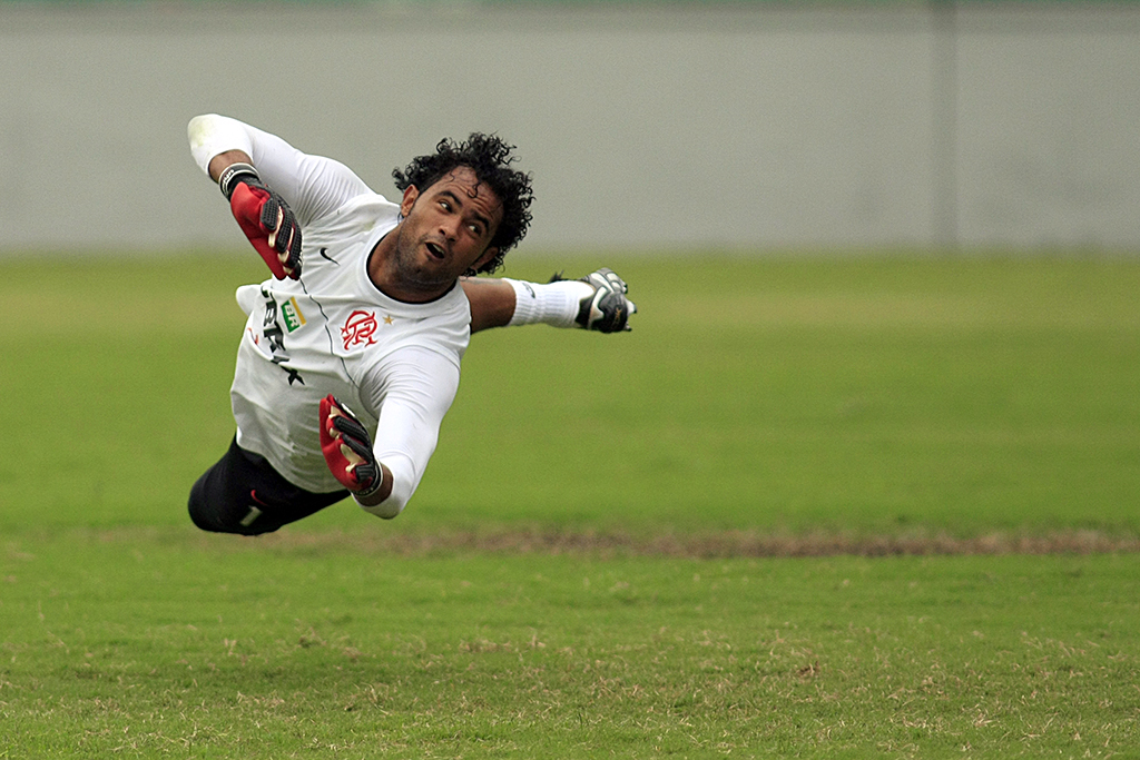 CT da Gávea